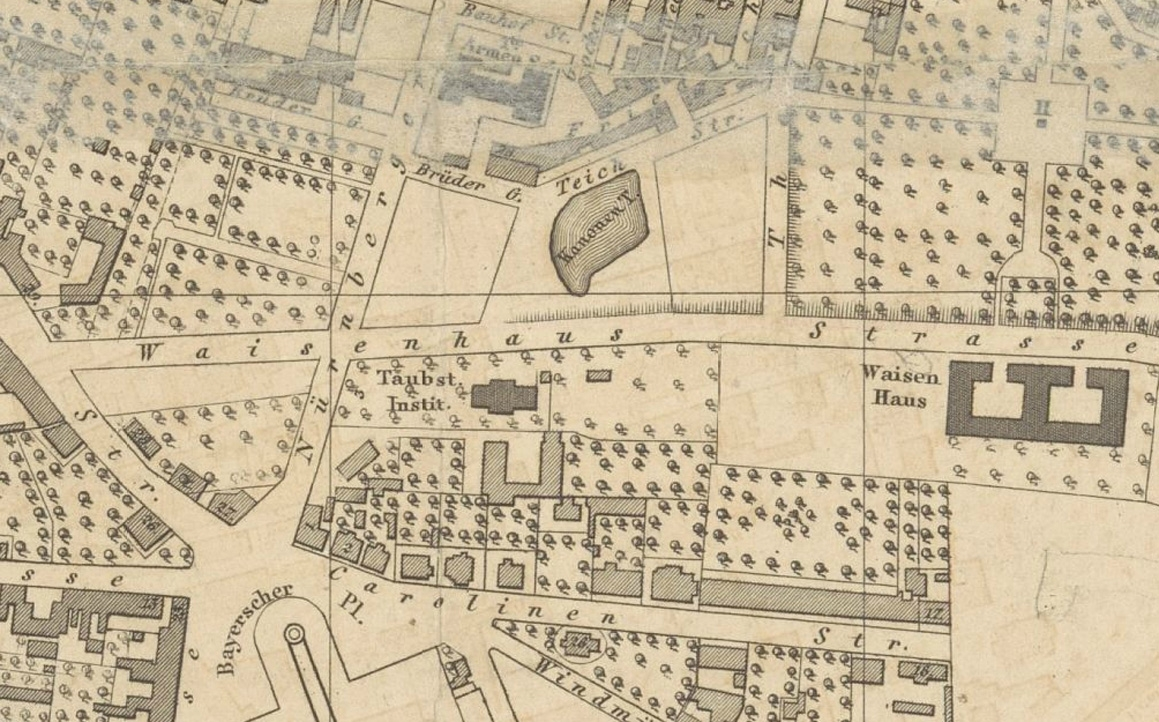 Ausschnitt aus: Plan von Leipzig und die im Osten angrenzenden Dörfer - Bereich südöstliche Vorstadt